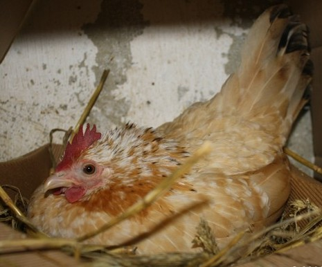 Serama Henne, brütend